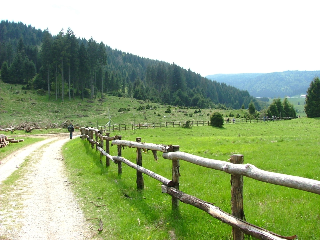 Il Cansiglio